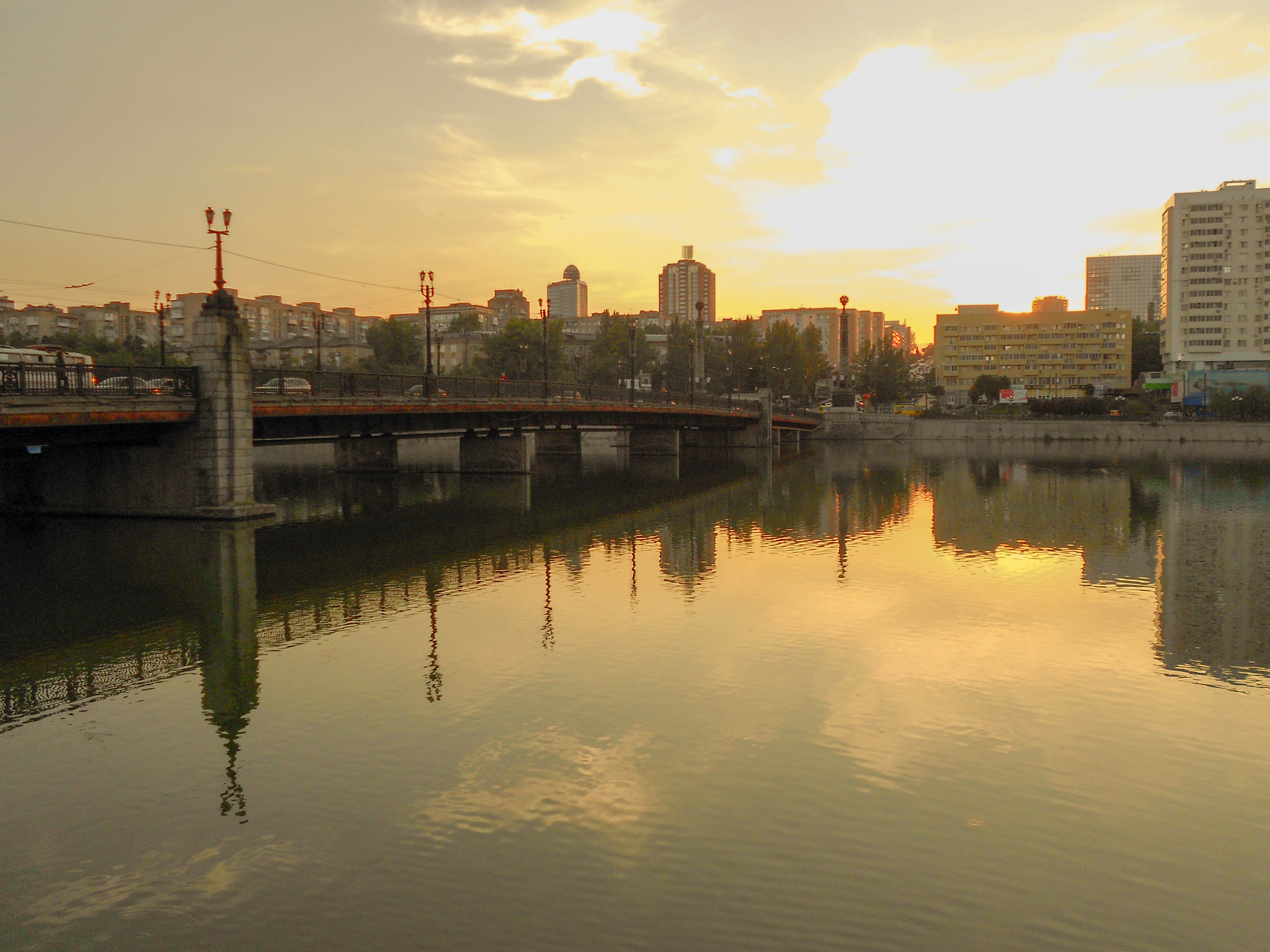 Архітектурний комплекс мосту через річку Кальміус, Донецьк, пр.Ілліча